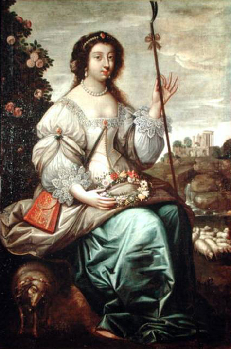 Portrait of Julie d'Angennes, duchesse de Montausier (1607-1671)